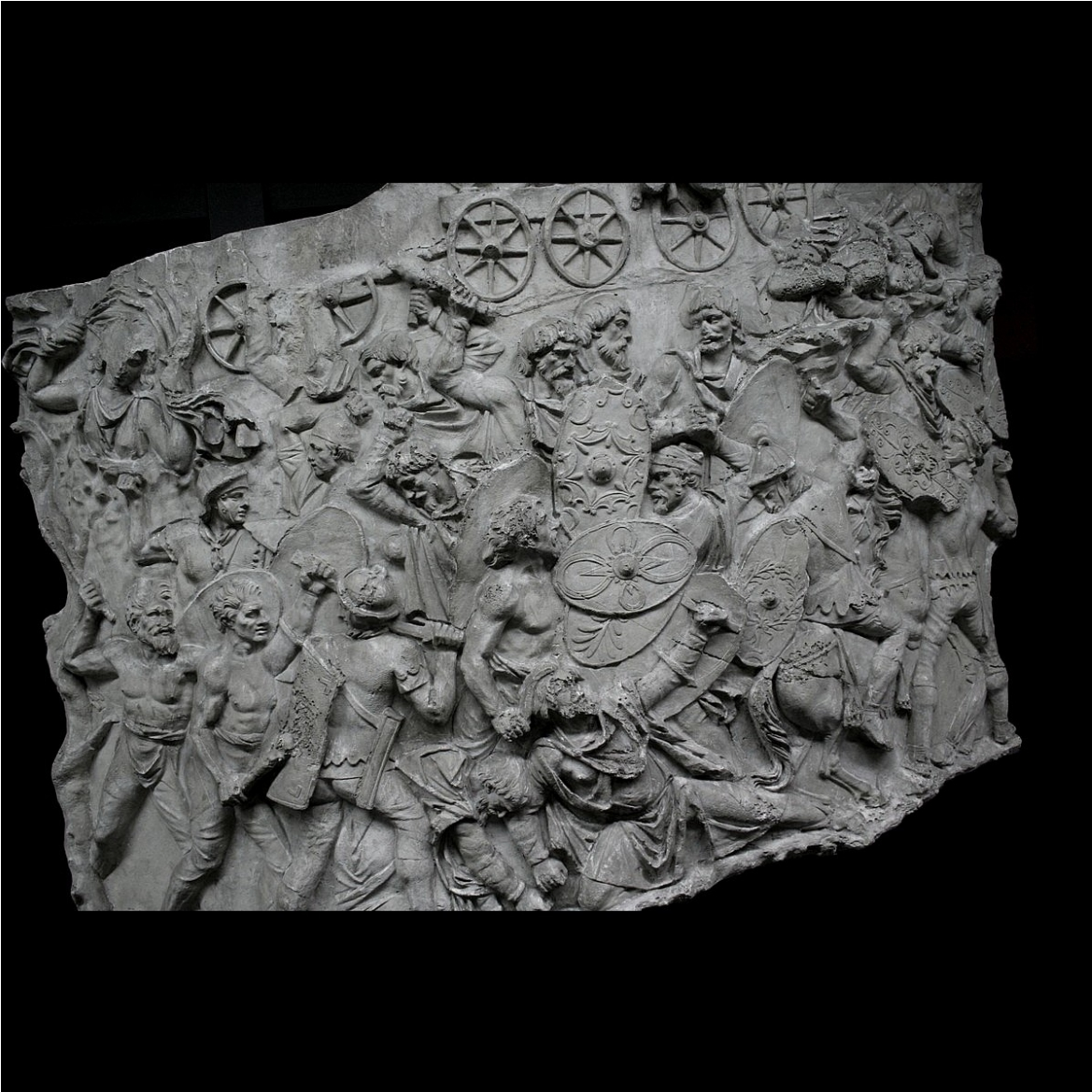 Moulage de la frise de la colonne Trajane, exposé au Museo della Civiltà Romana, Rome.